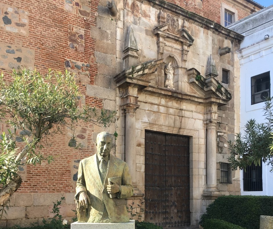 Portada de la iglesia del antiguo convento de Santa Clara en Mérida, España.